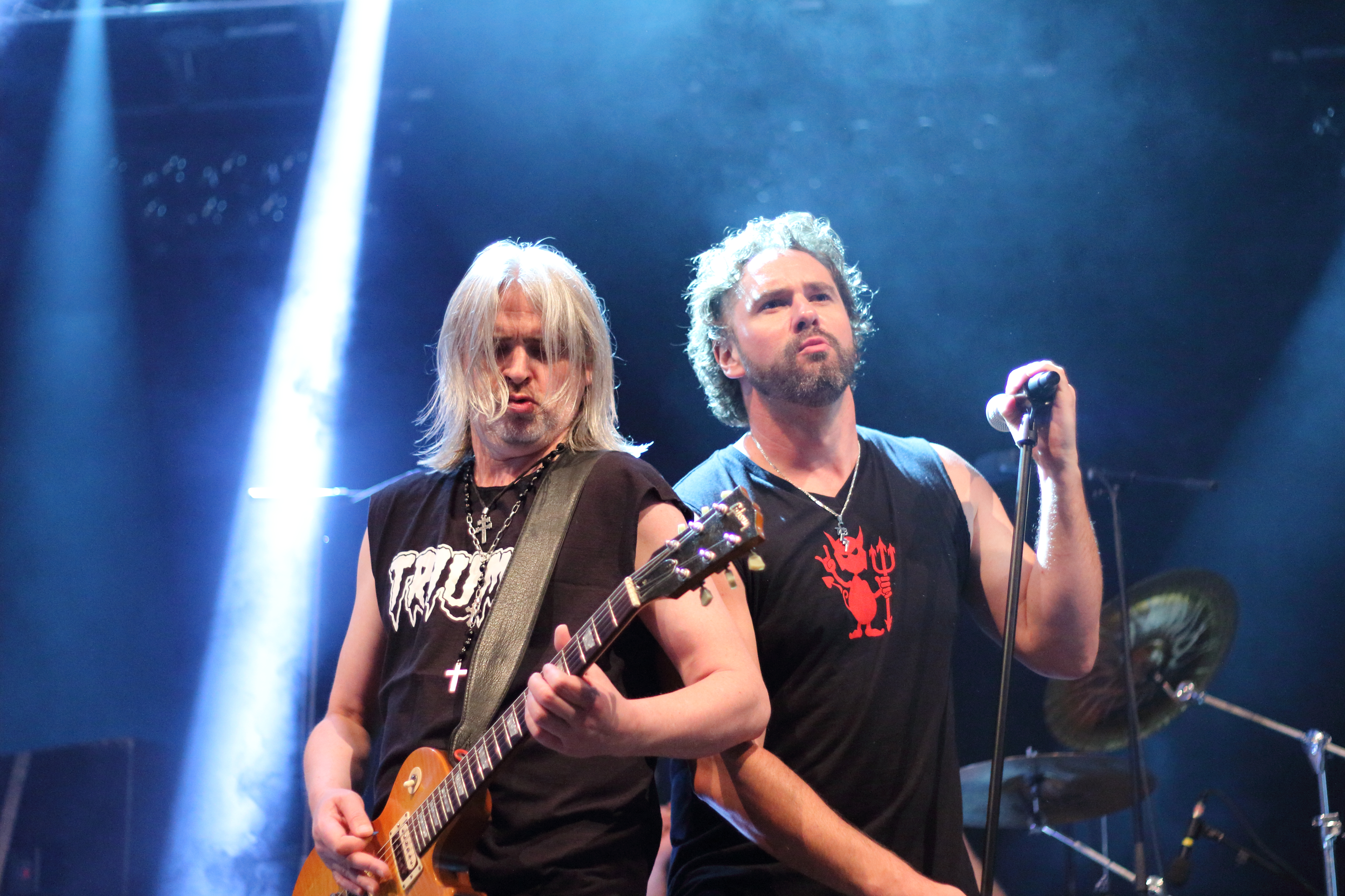 PictureOn 2014